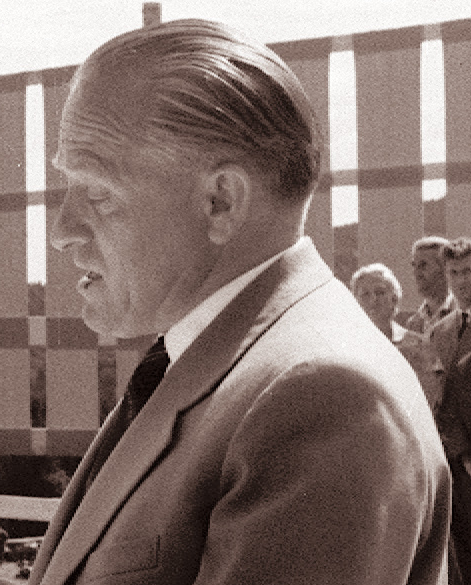 Viktor Avbelj med govorom ob 20. obletnici vstaje v Ribnici na Pohorju.